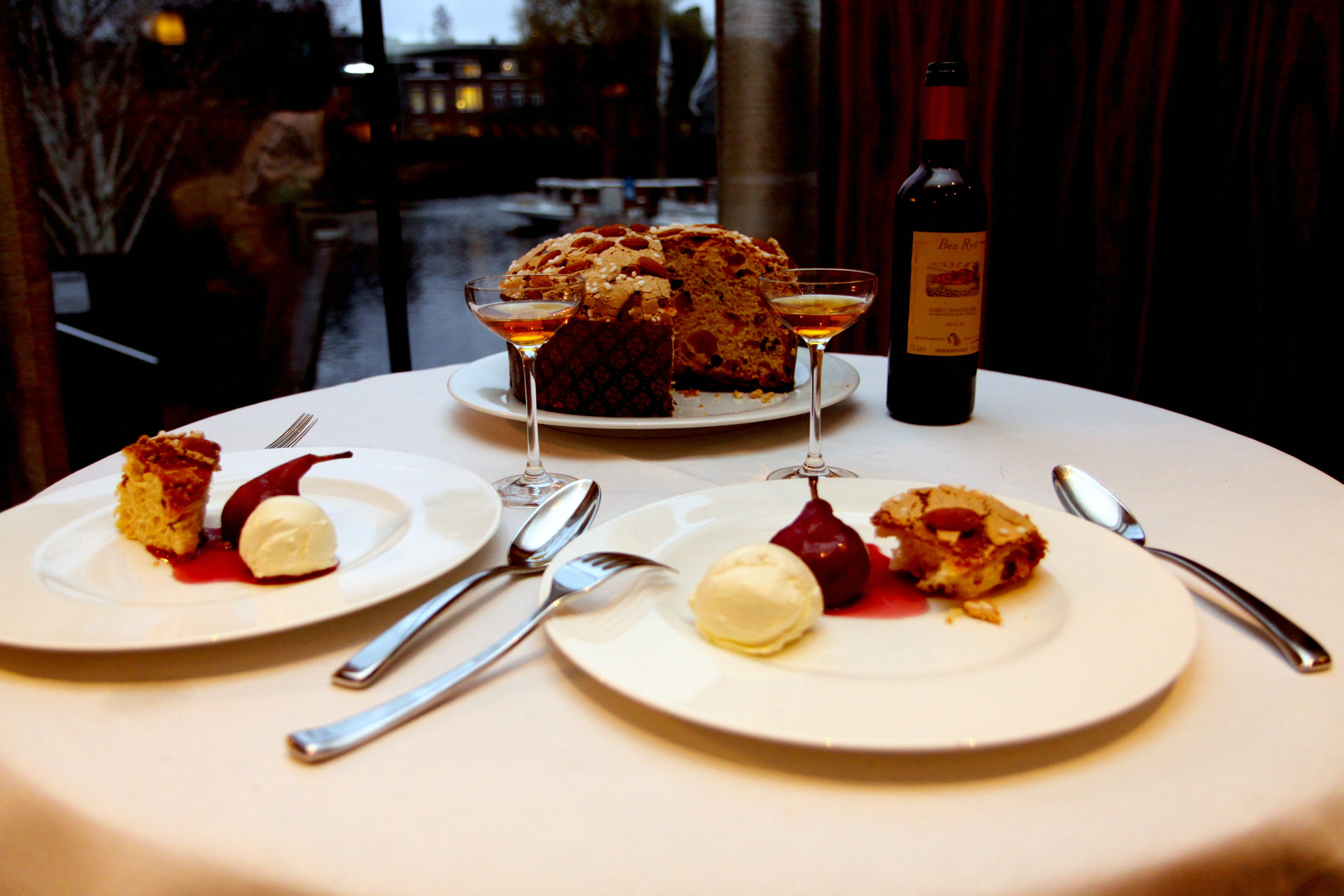 Pere al nebbiolo con gelato e panettone